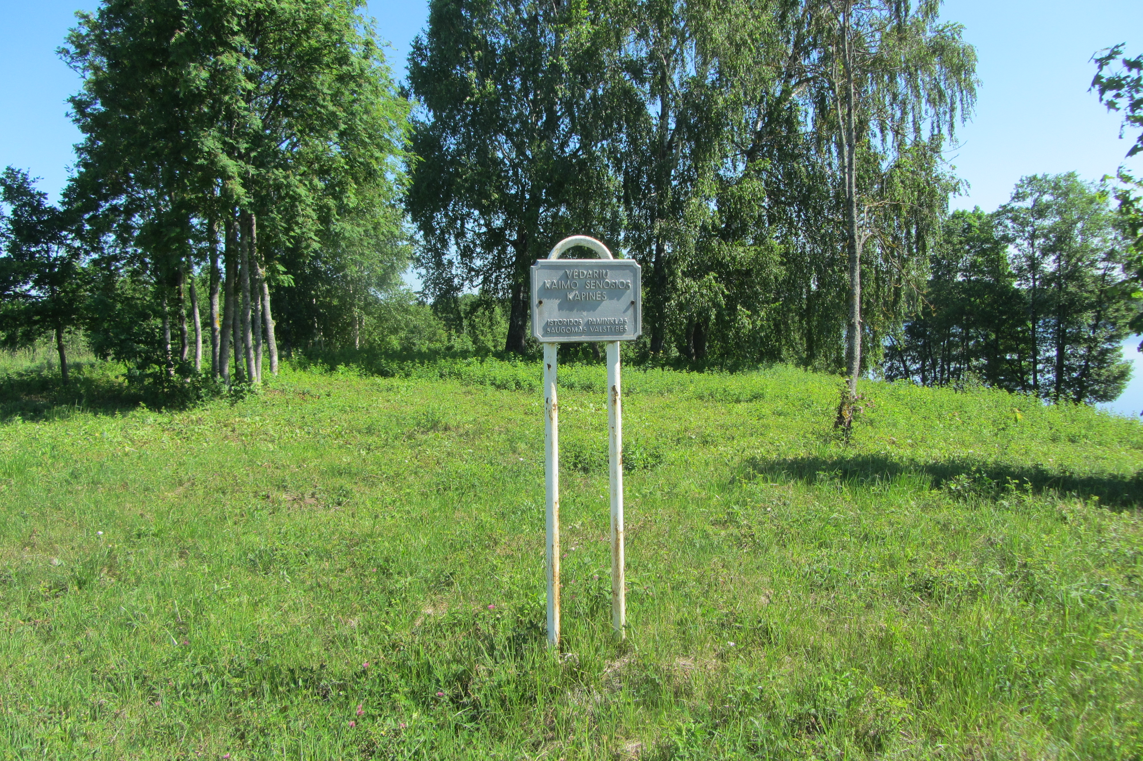 Antazavės sen., Lithuania